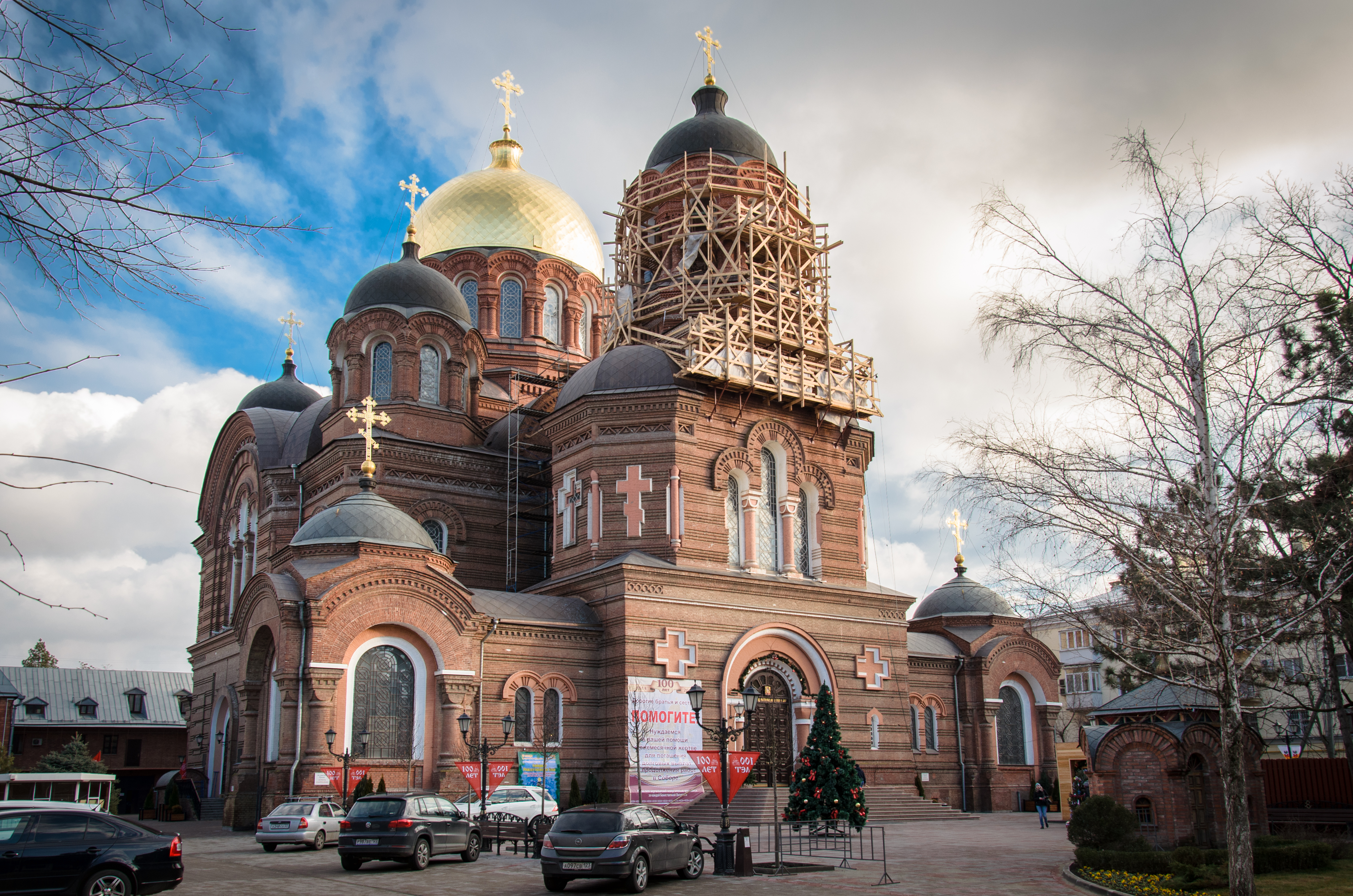 Екатерининский кафедральный собор с интерьером: улица Коммунаров, 52, Краснодар, Краснодарский край